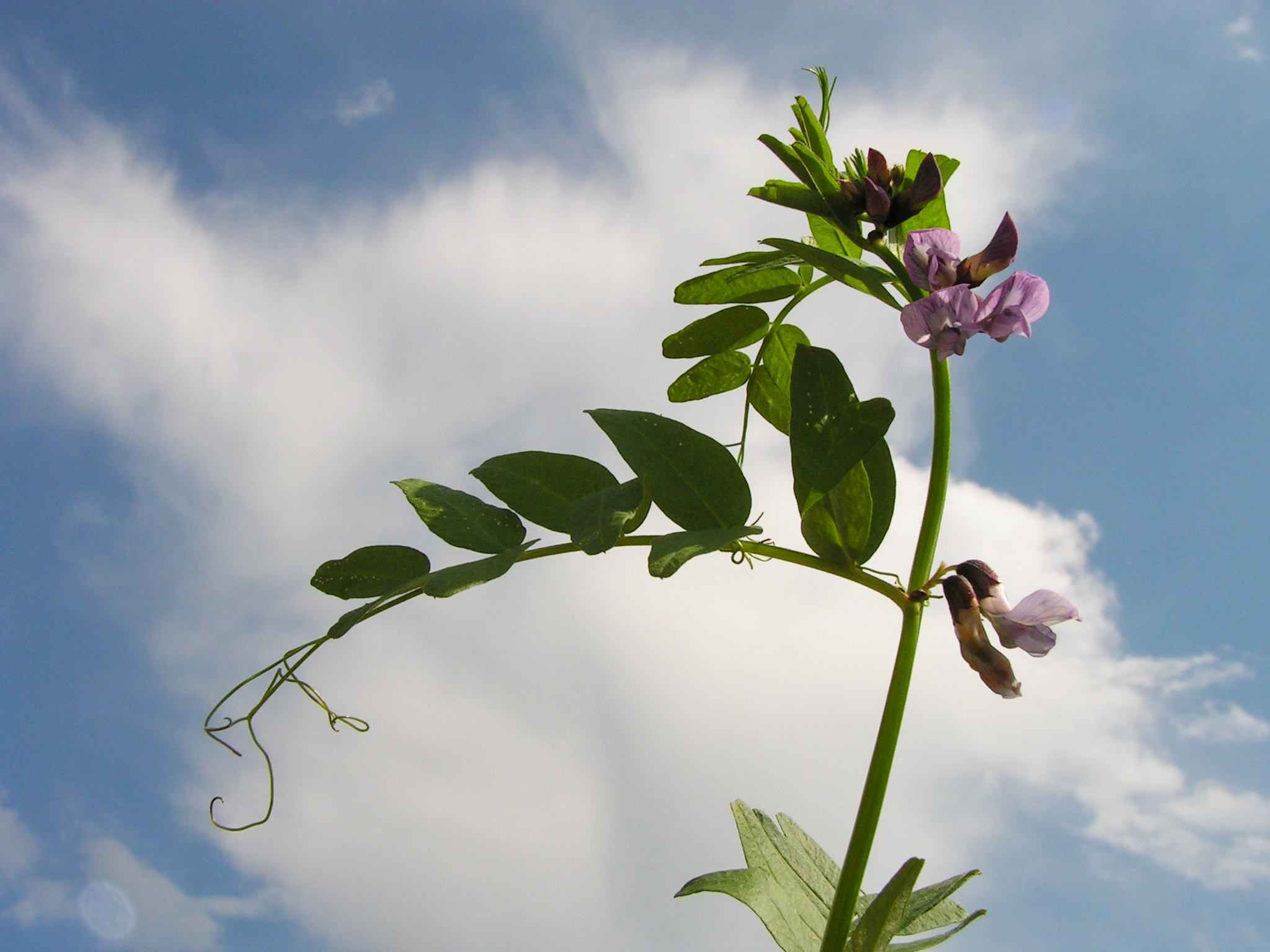 Vicia sepium. Moscow region, Russia.